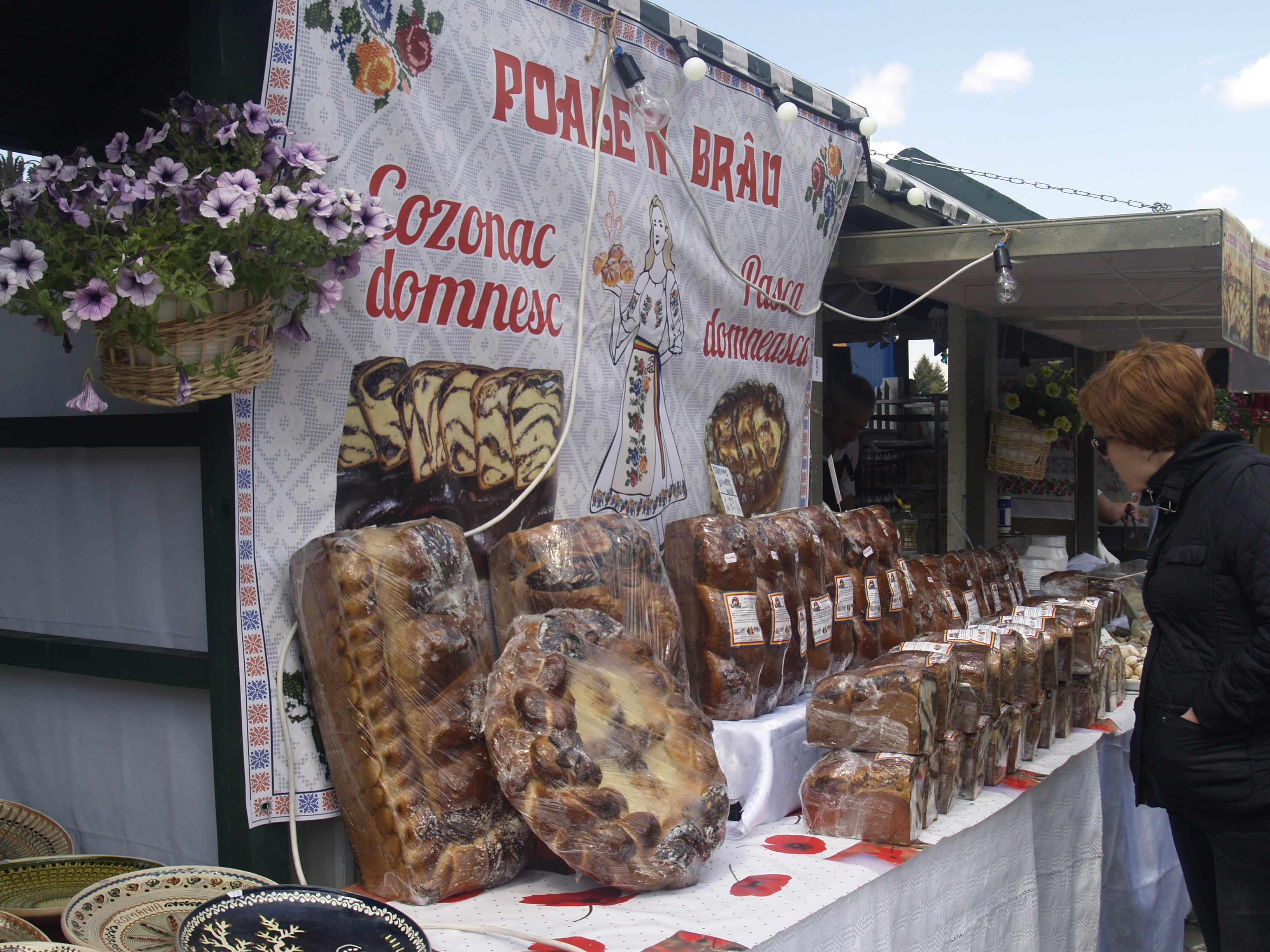 Mercado de Pascua en la plaza de la Constitución de Bucarest en abril de 2017